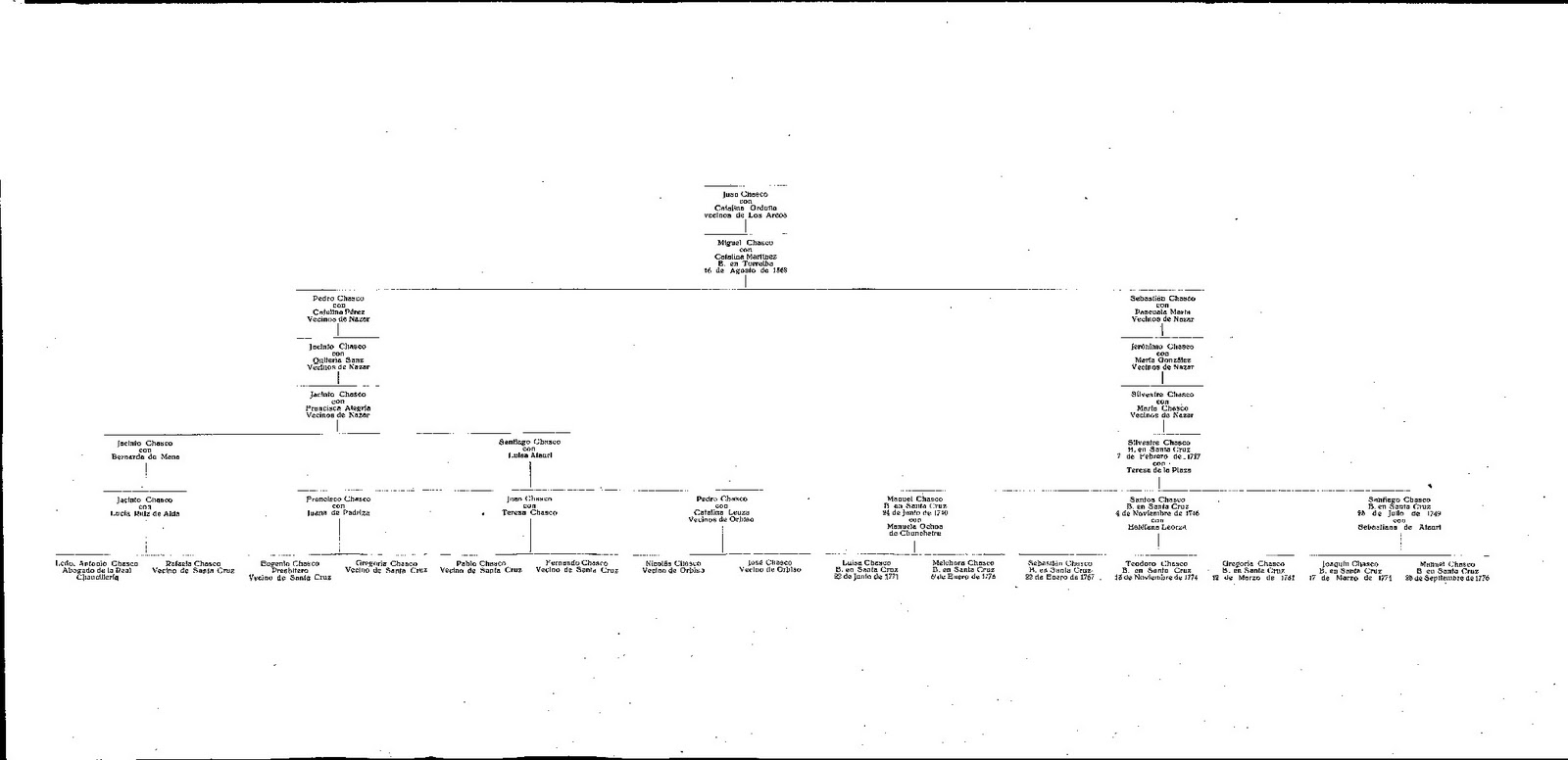 Arbol genealógico de la familia Chasco